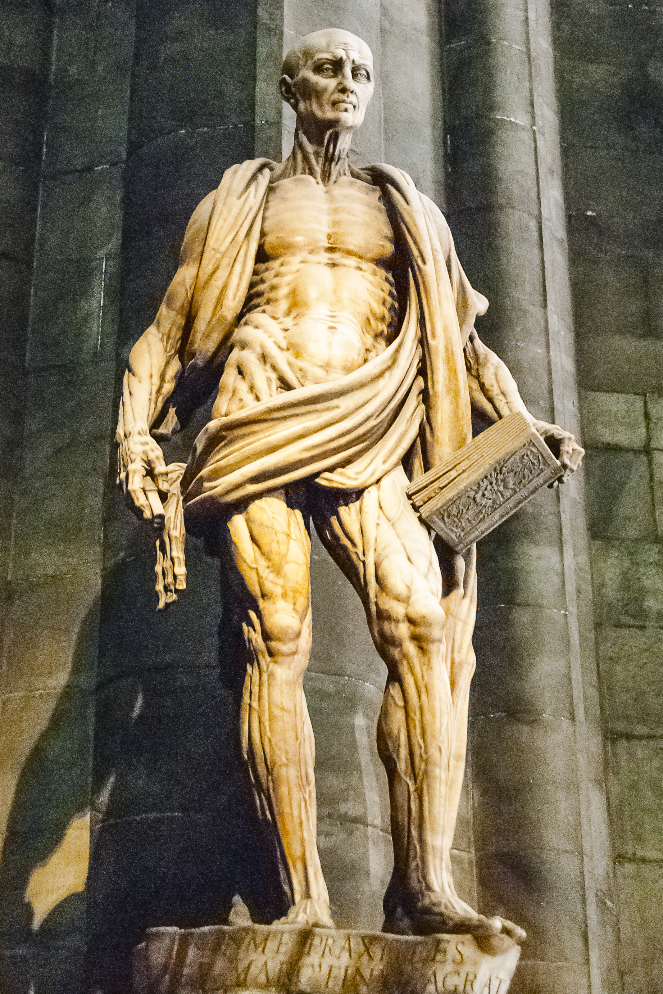 Wnętrze Katedry Duomo (Mediolan - Włochy)